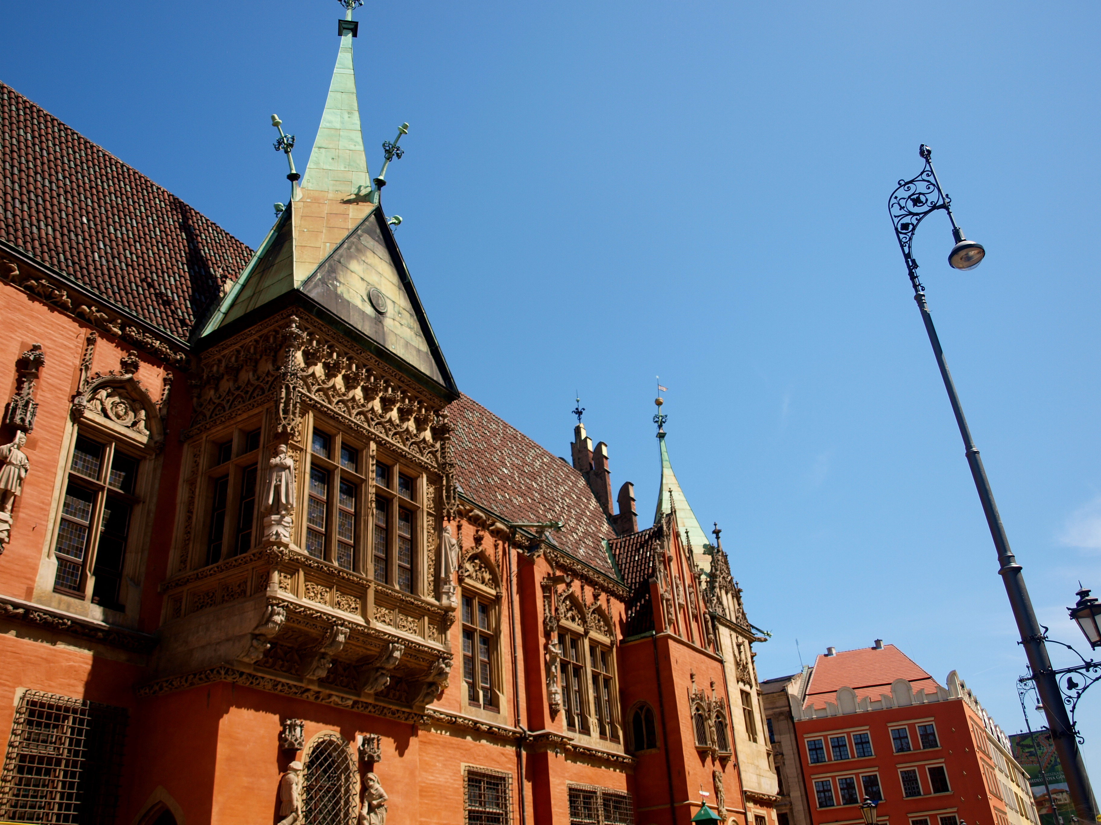 Ratusz